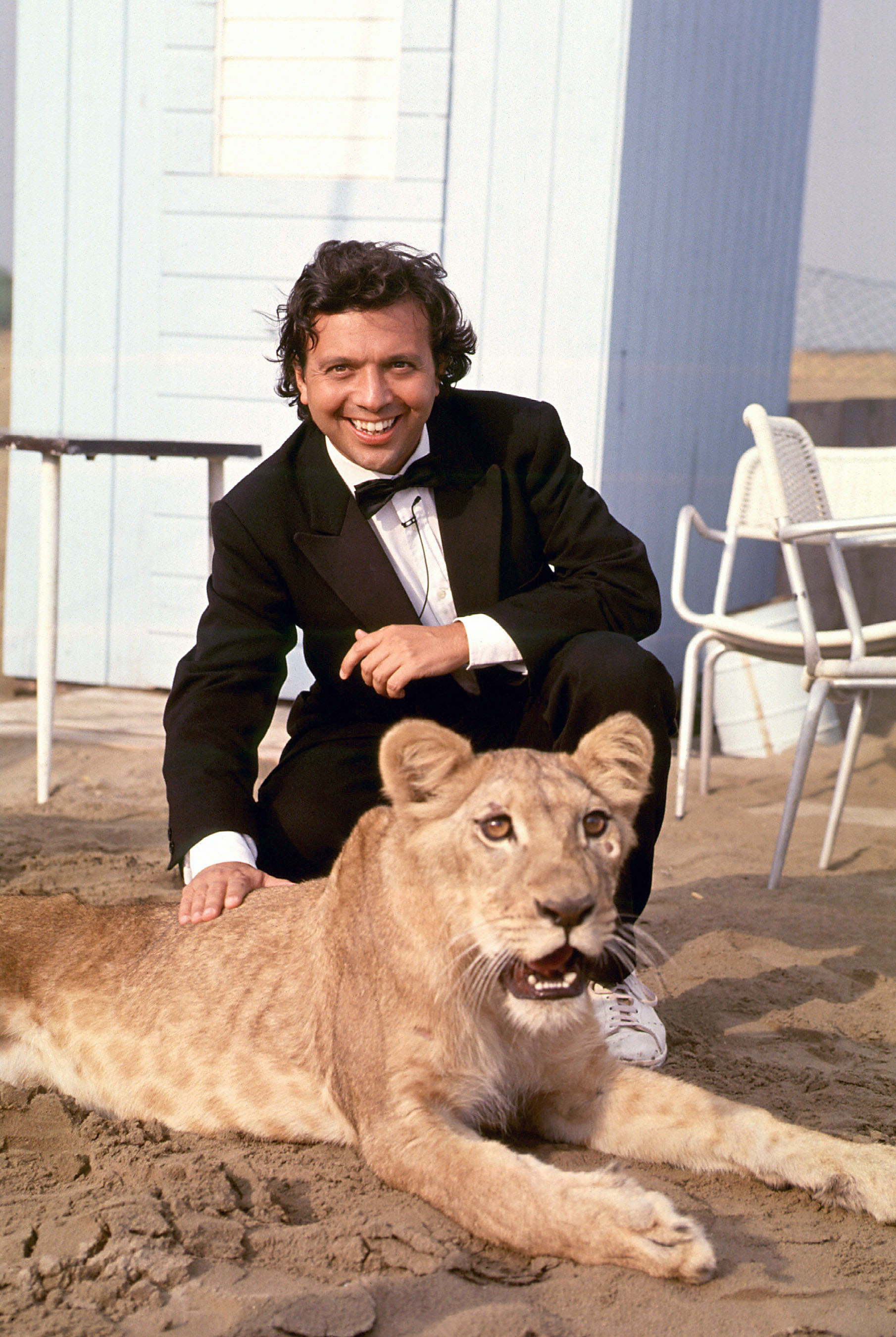 Piero Chiambretti